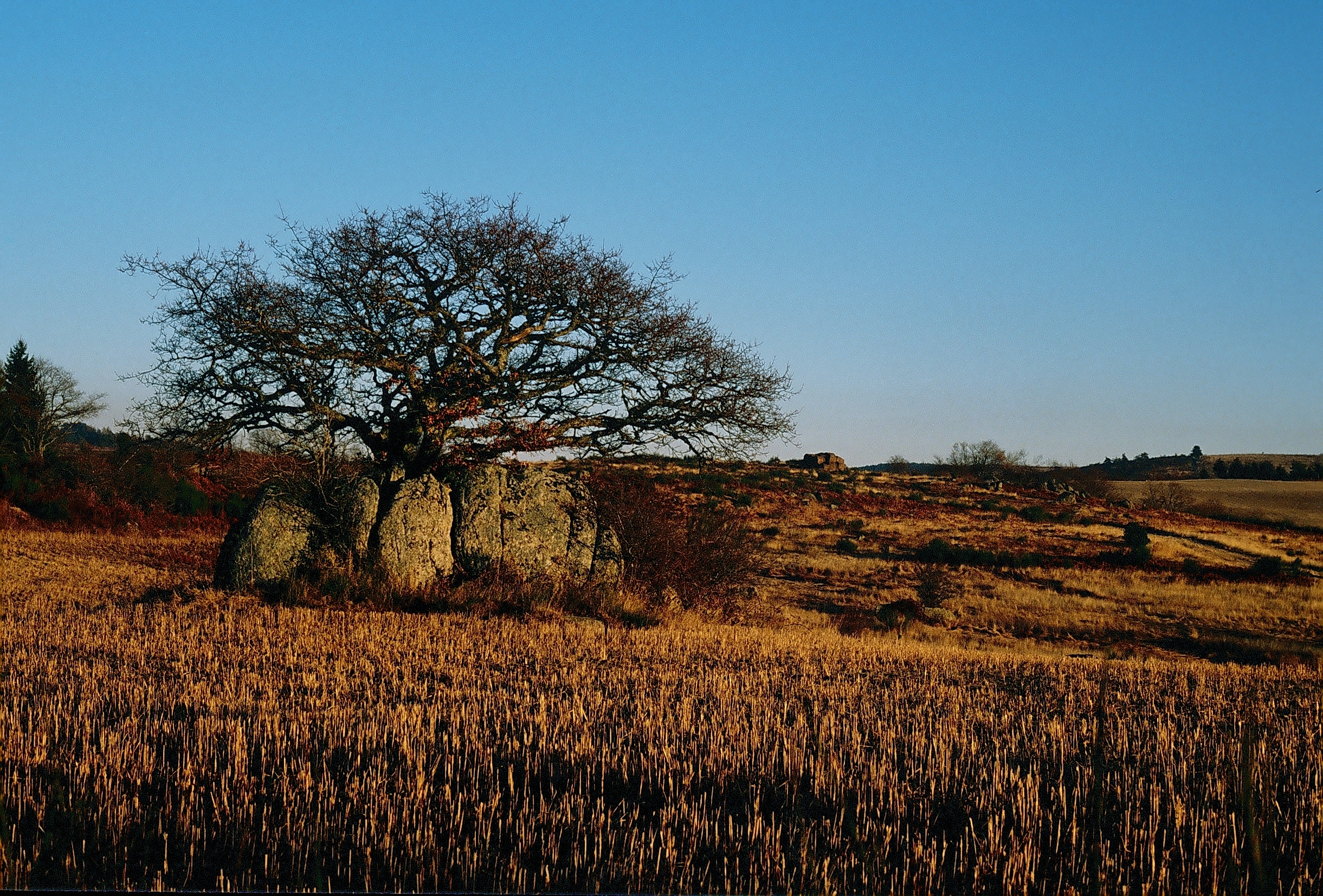 Paysage dans le Rouergue, Aveyron, France.